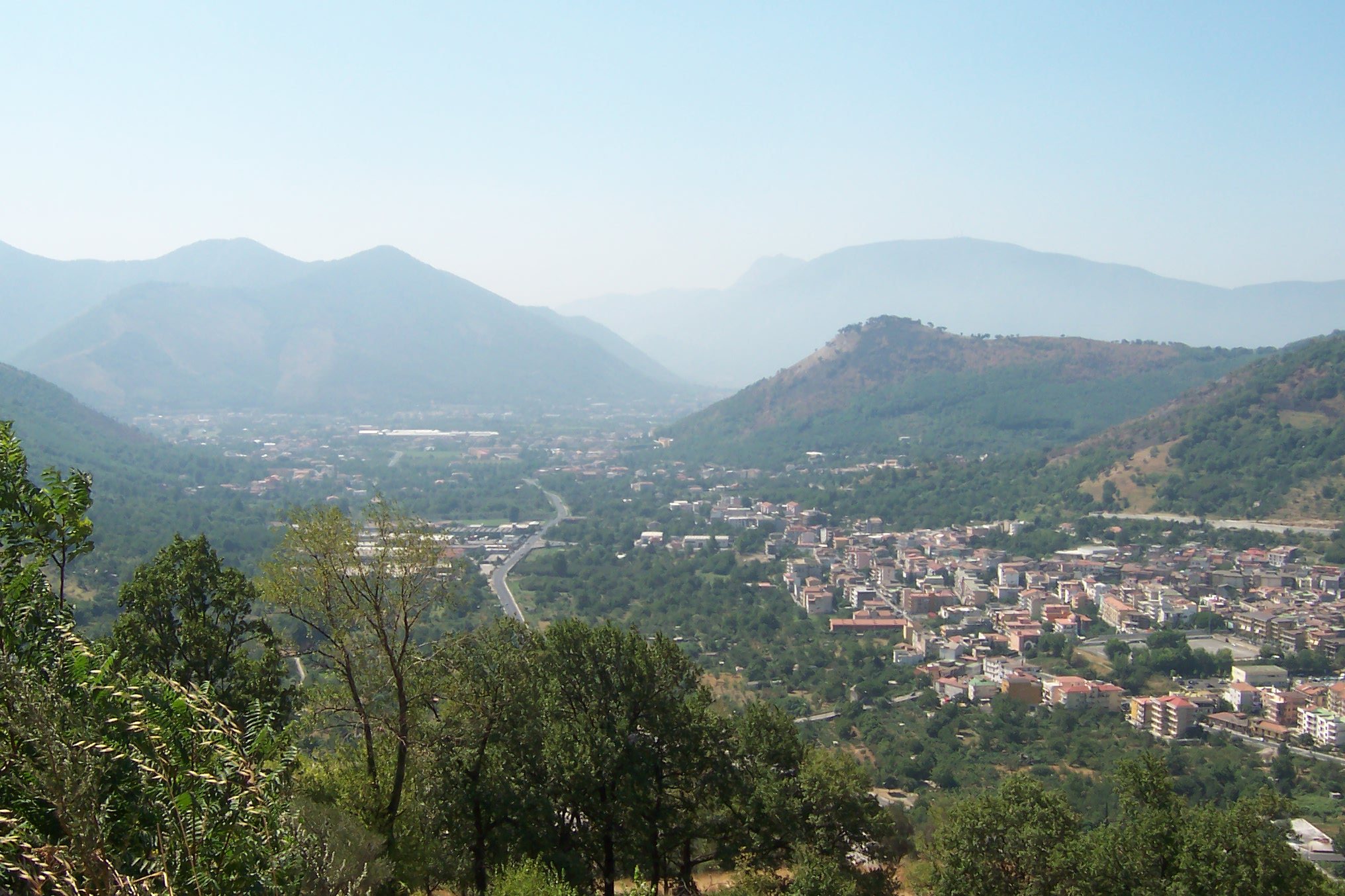 Siano (vista dell'entrata nella vallata dal monte Le Porche) - Kodak Digital Cam.